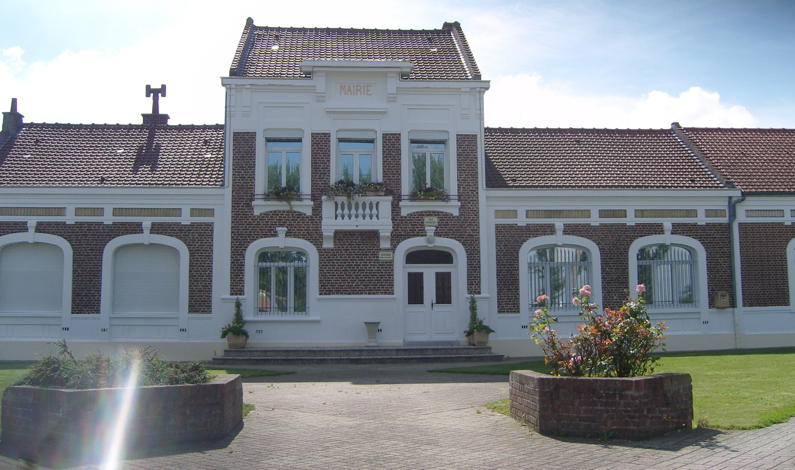 Bellonne Mairie_Pas-de-Calais